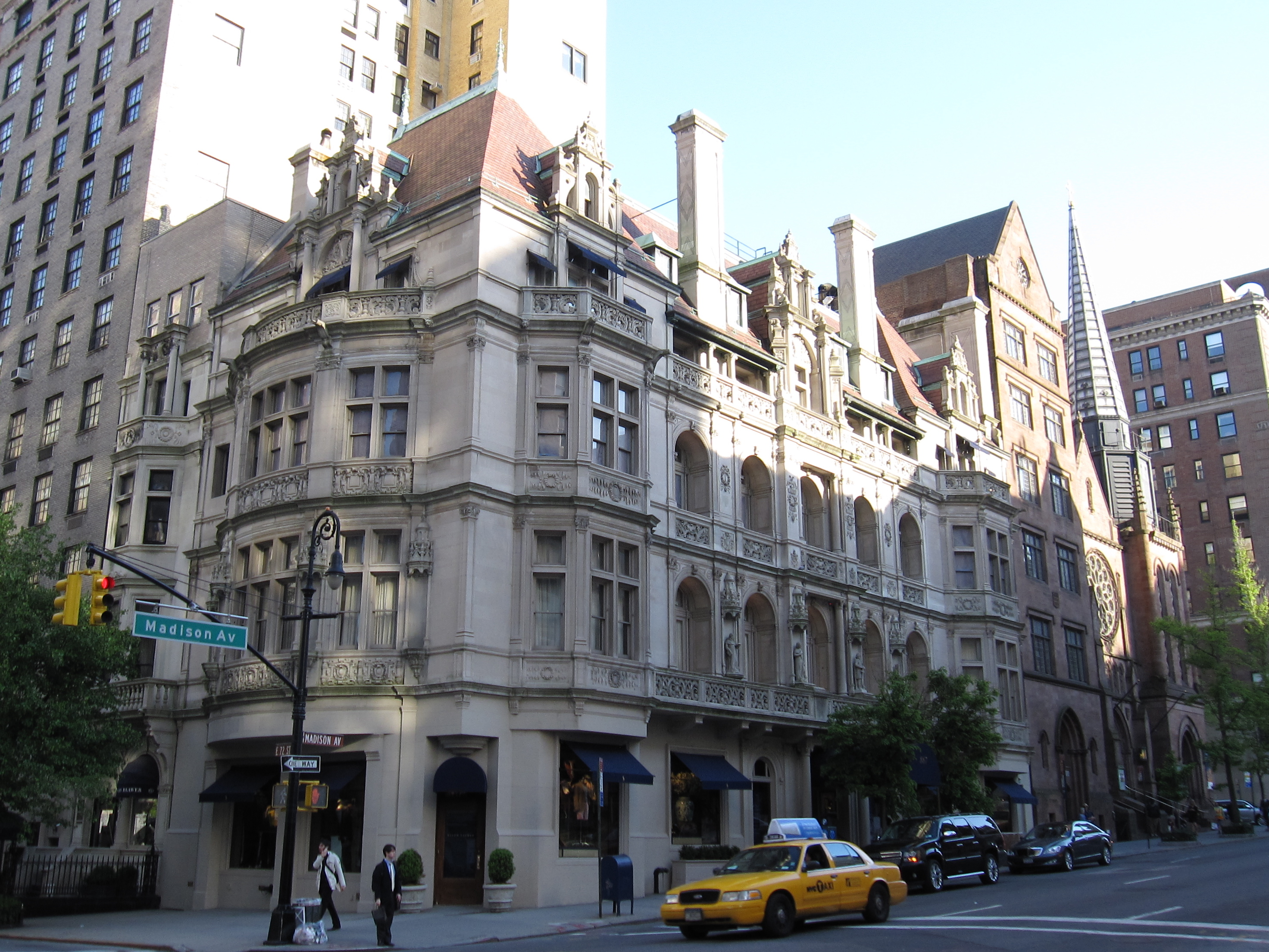 Gertrude Rhinelander Waldo Mansion